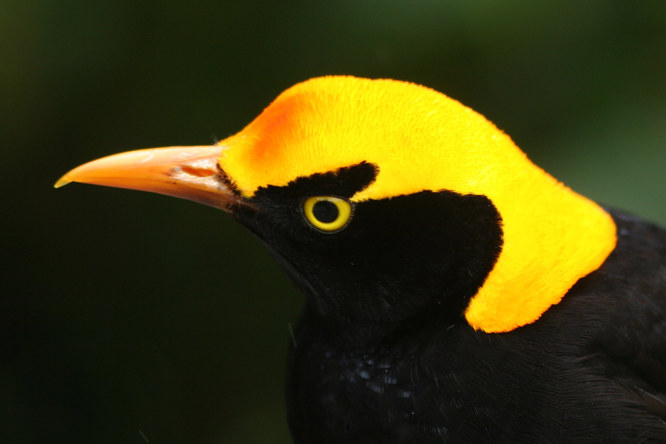 Regent Bowerbird, Sericulus chrysocephalus, male; wild bird